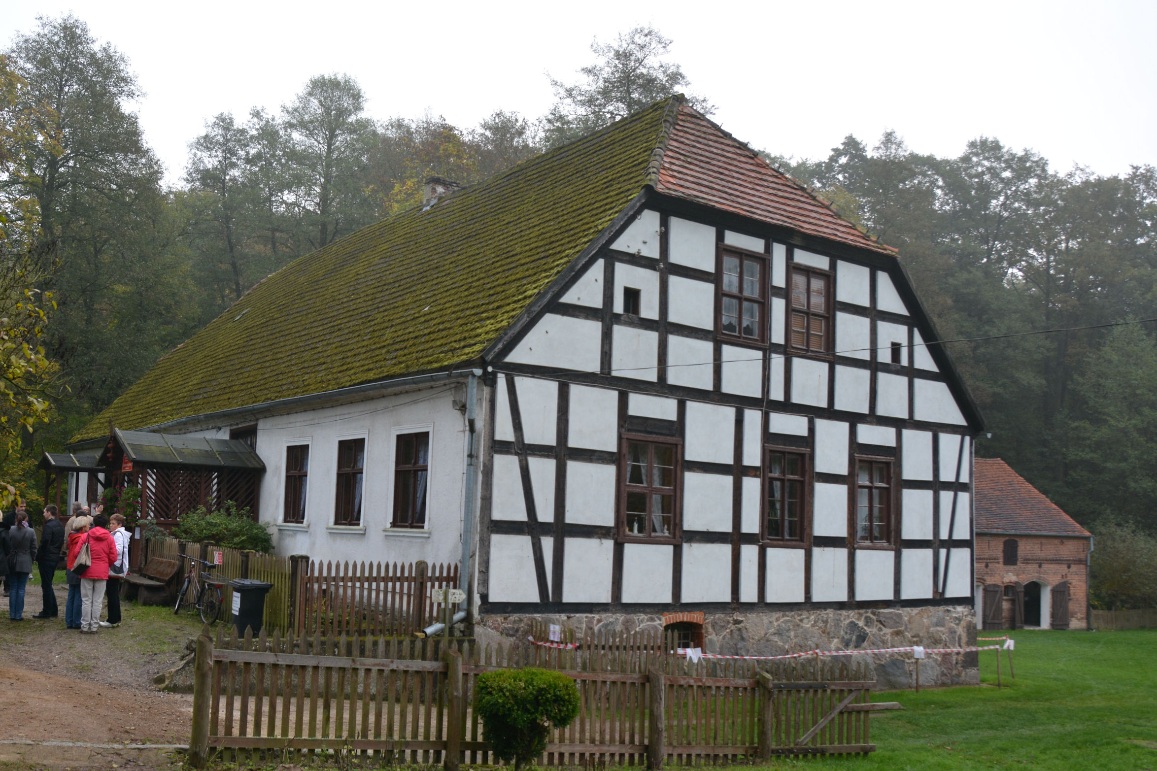 Bogdaniec - młyn wodny, obecnie Muzeum Lubuskie "Zagroda Młyńska" w Bogdańcu, 1826